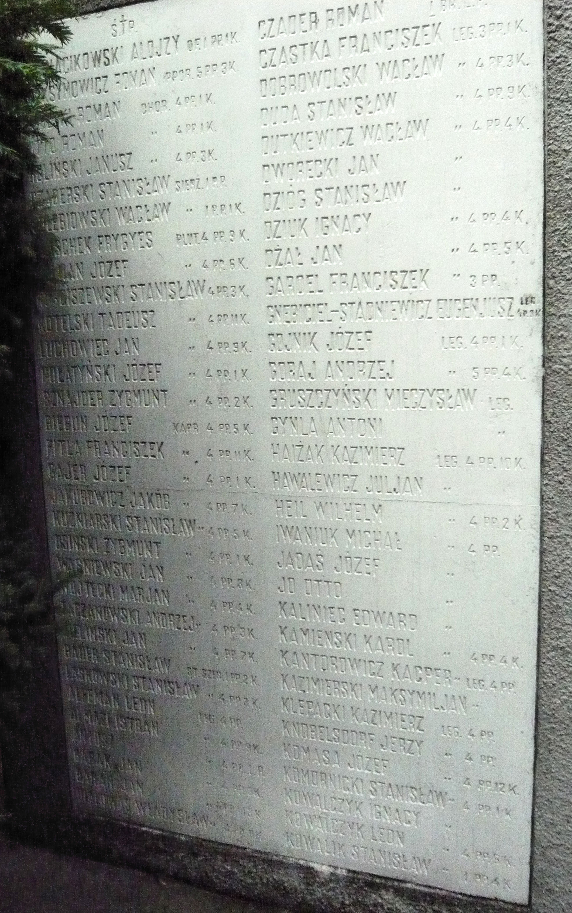 Tablica na pomniku Legionistów w Jastkowie